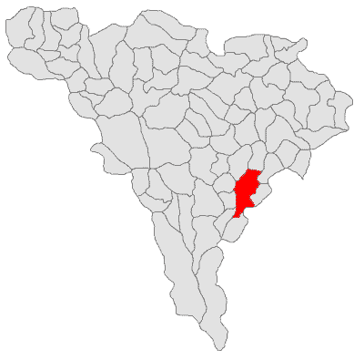 Categorie:Hărţi ale judeţului Alba